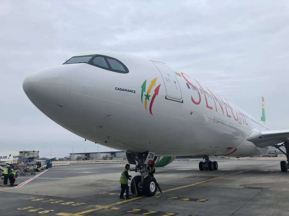 A330neo Air Sénégal à l'aeroport CDG